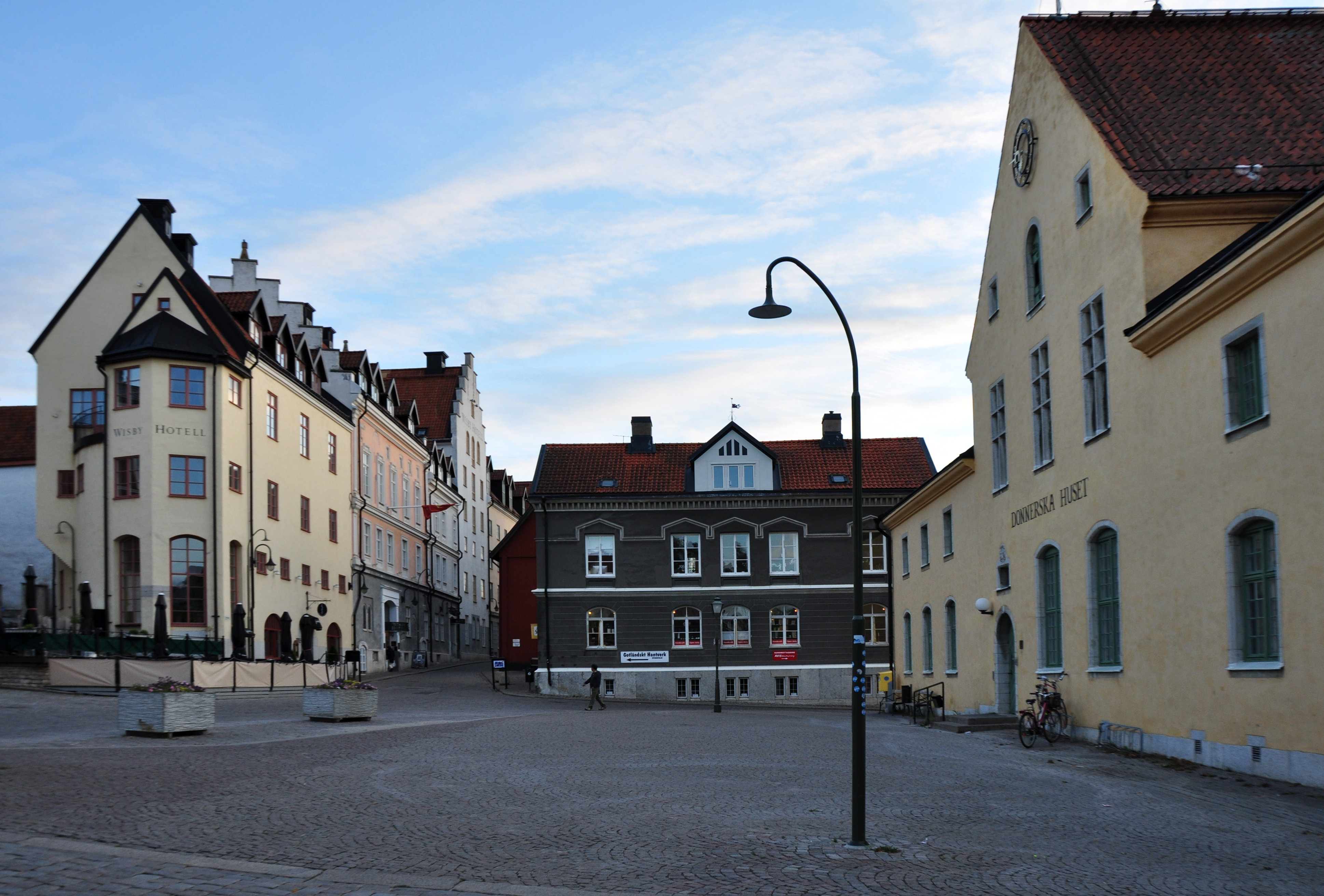 Donners plats, i mitten syns Hultmanska huset, Residenset 5, Visby. Till vänster Wisby hotell och till höger Donnerska huset.